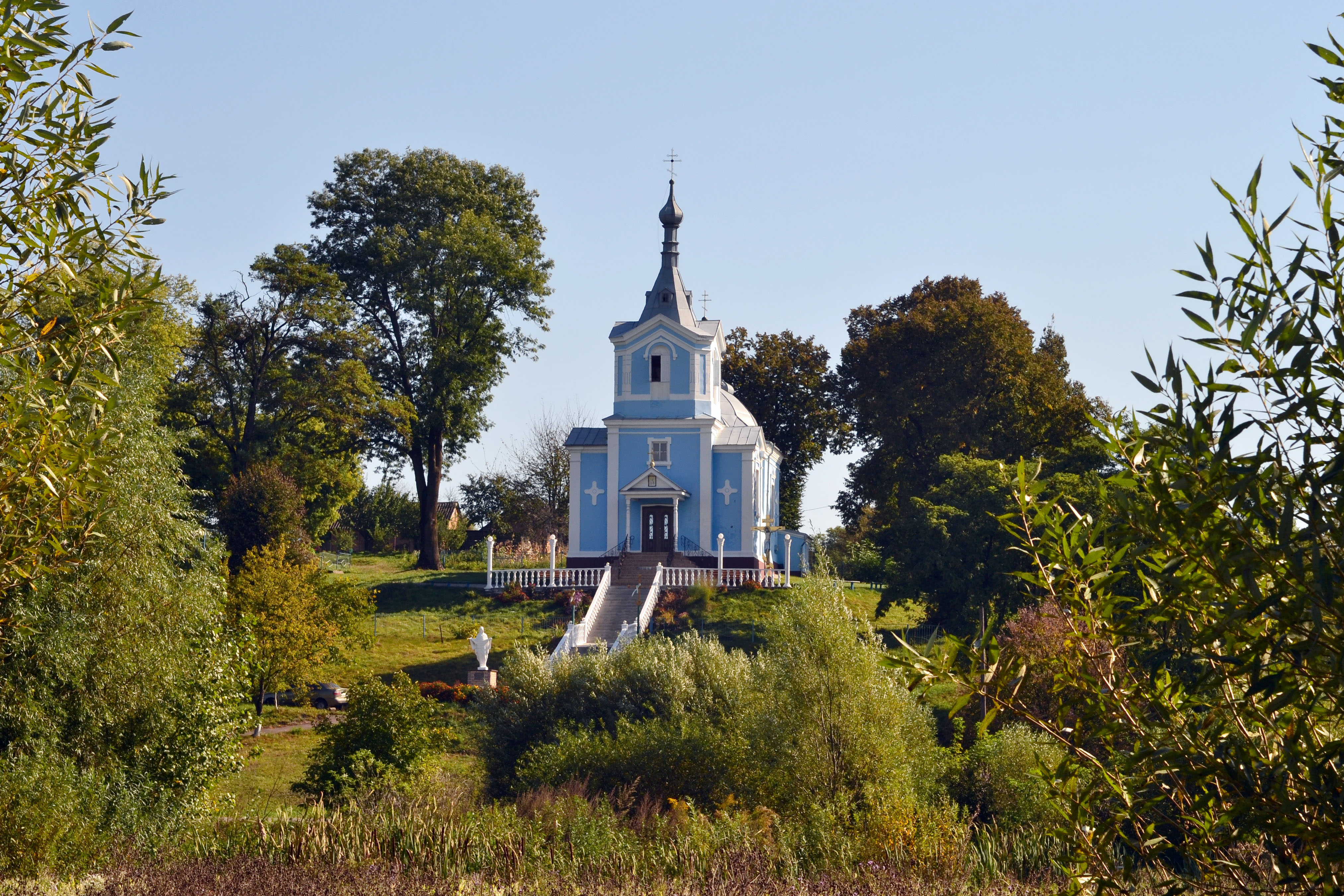 Миколаївська церква (мур.) (1638 рік) - вигляд із заходу - Охлопів Горохівський район Волинська область Україна